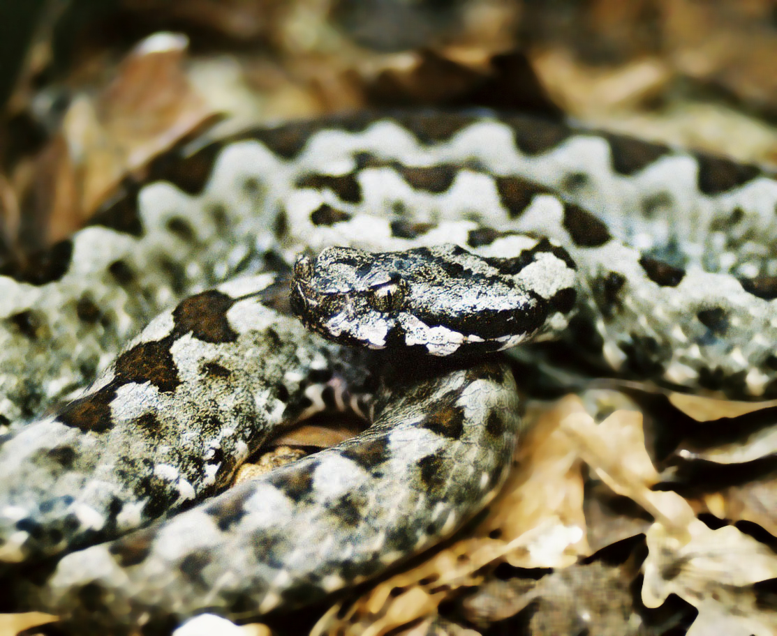 Hím homoki vipera (Vipera ammodytes meridionalis) Montenegróban